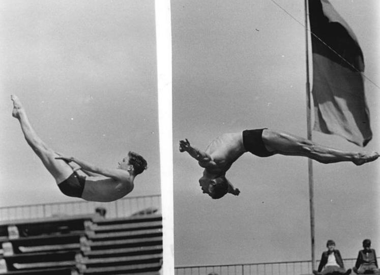 Lothar Mathhes, Hans-Dieter Pophal Zentralbild Koch Wen-Ki. 14.7.1966 Leipzig: Deutsche Meisterschaften im Wasserspringen der Damen am 13.7.1966 Hans-Dieter pophal (TSC Berlin, rechts) sicherte sich auch dieses Jahr wider den Titel im Kunstspringen. Links: Im Turmspringen erkämpfte sich Lothar Mathhes (SC Einheit Dresden) den Titel.